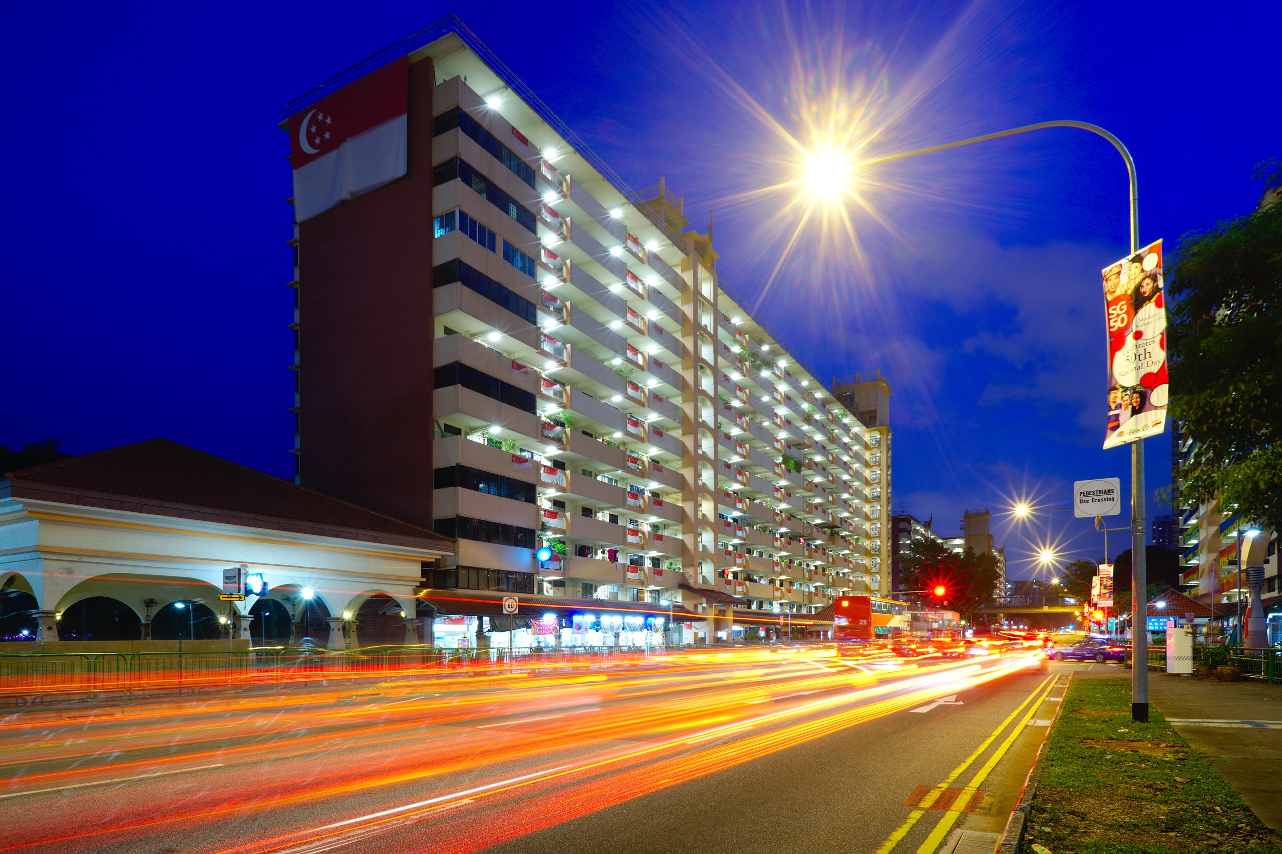 Block 44 Bendemeer Road, Singapore